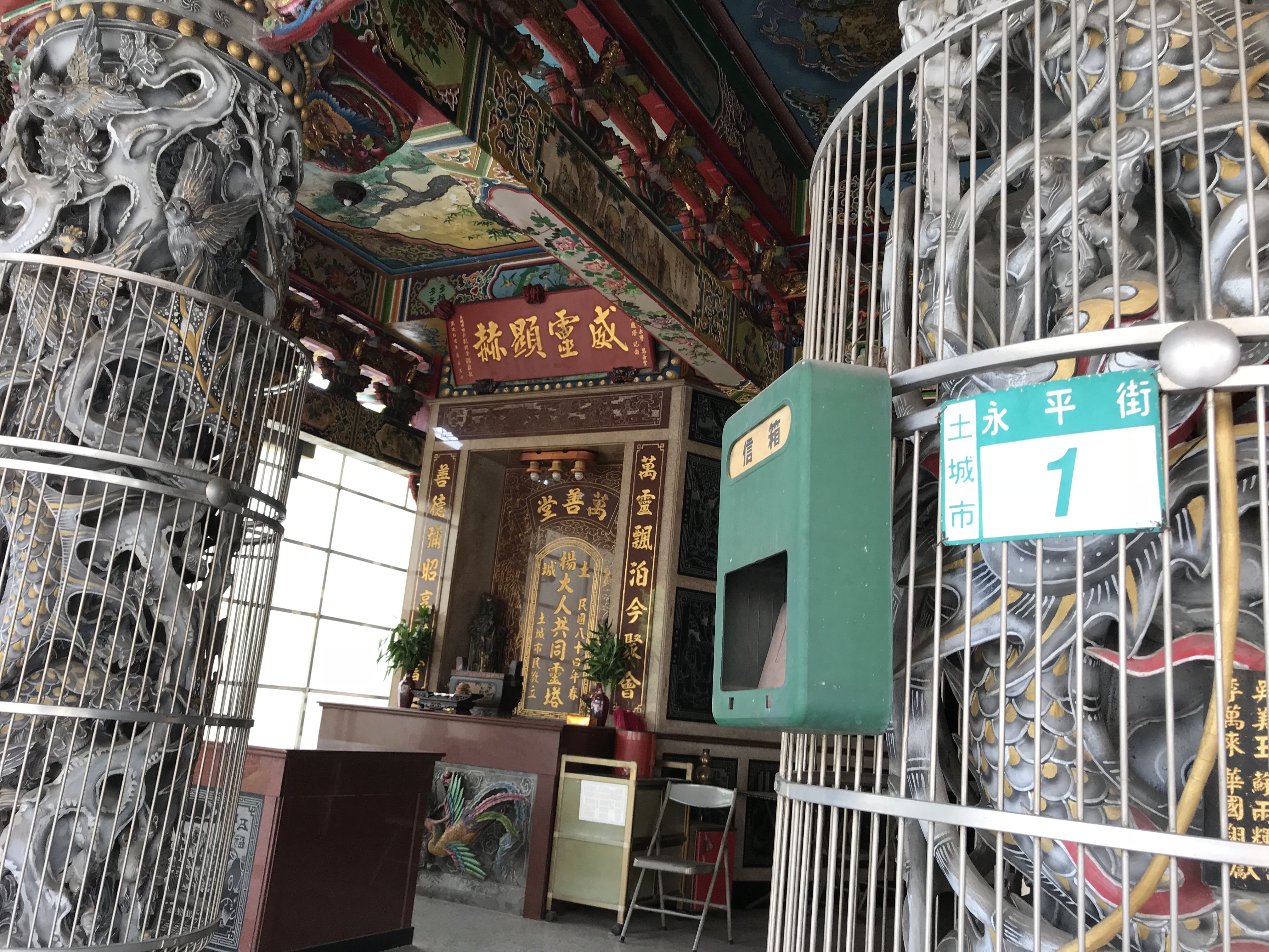 中文（台灣）: 永寧福德宮楊大人神位與門牌